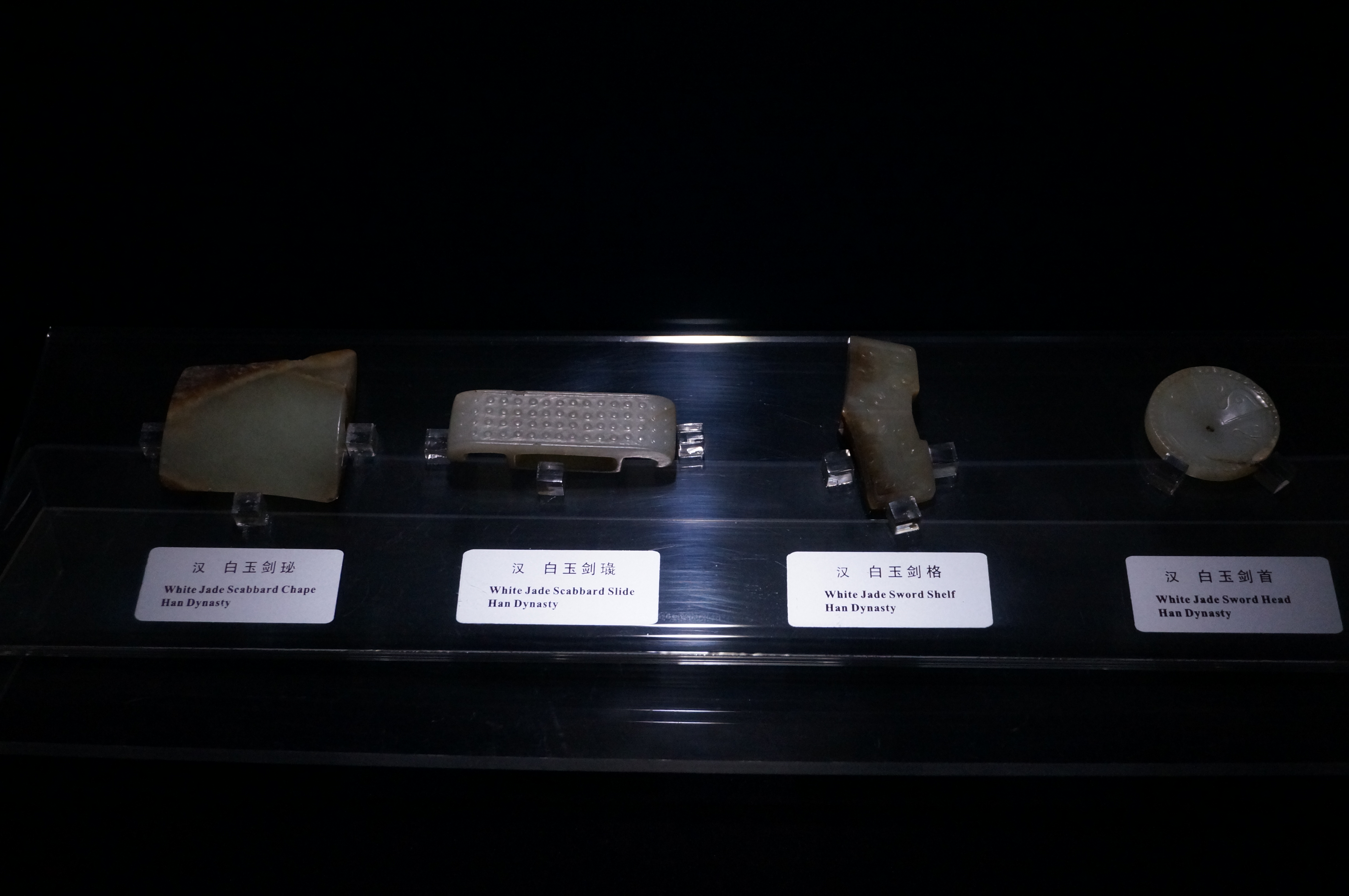 汉代玉具剑白玉构件，自左至右分别为剑珌、剑璏、剑格、剑首，常熟博物馆藏。